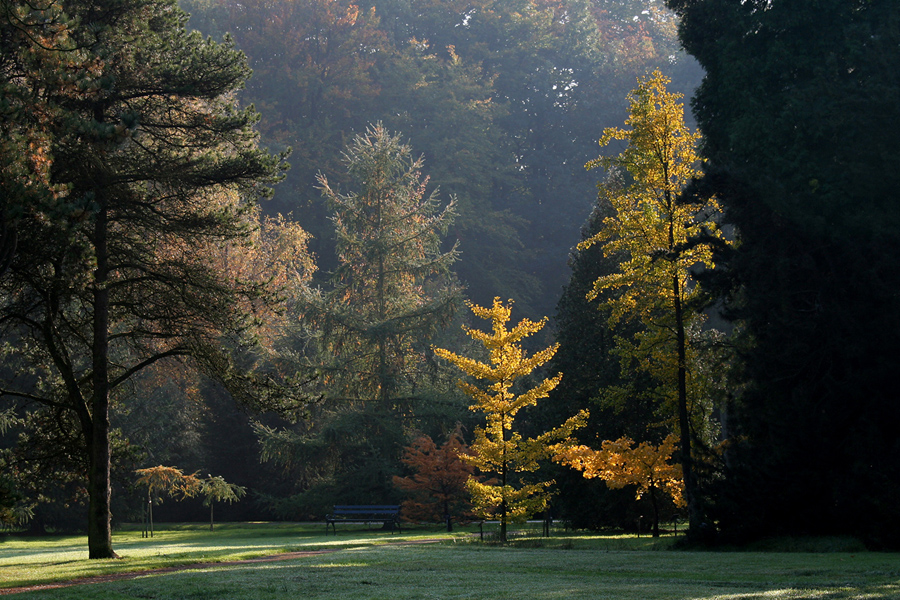 De Lutte, Arboretum Poortbulten